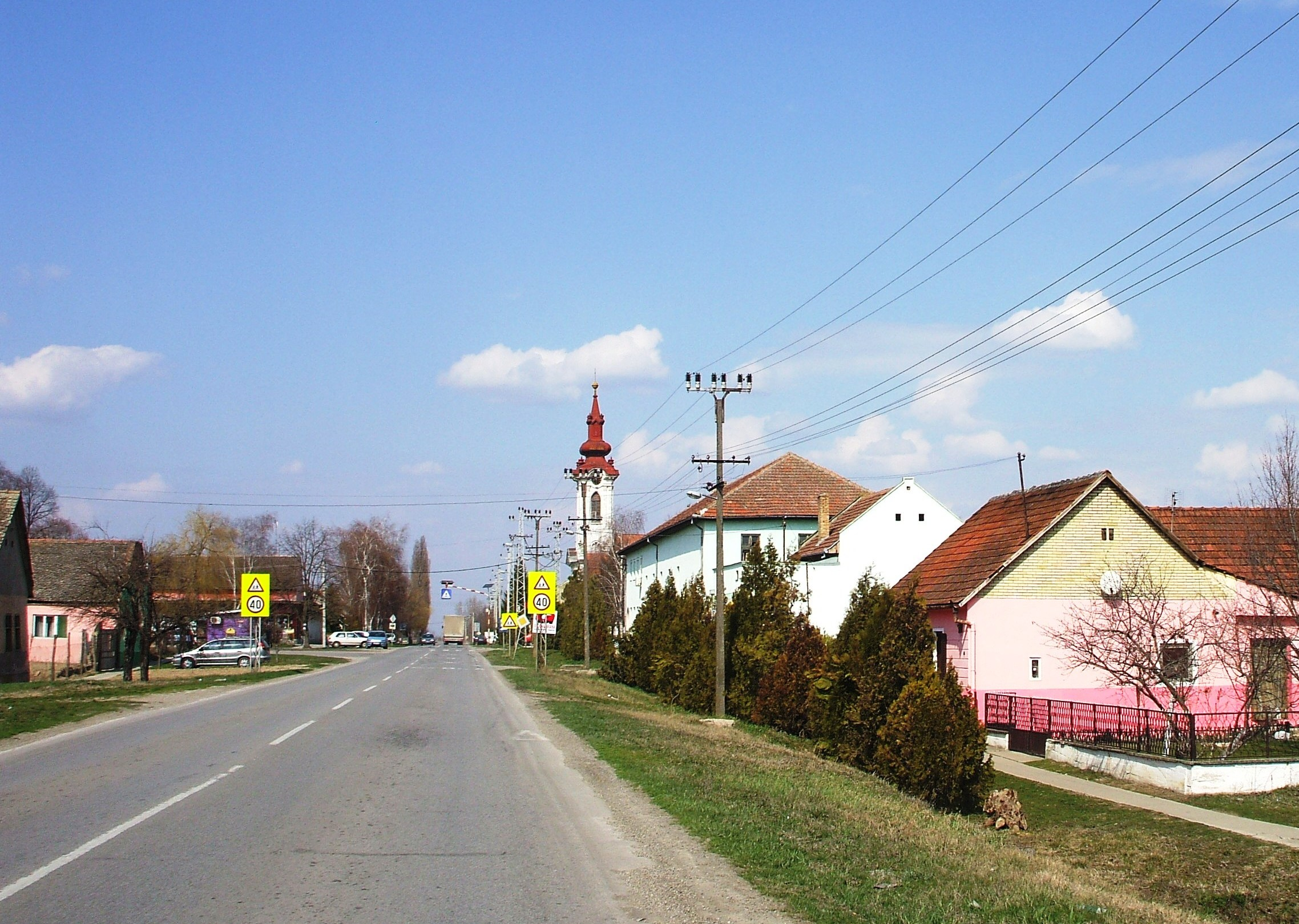 Православна црква у Парагама - Orthodox Church in Parage